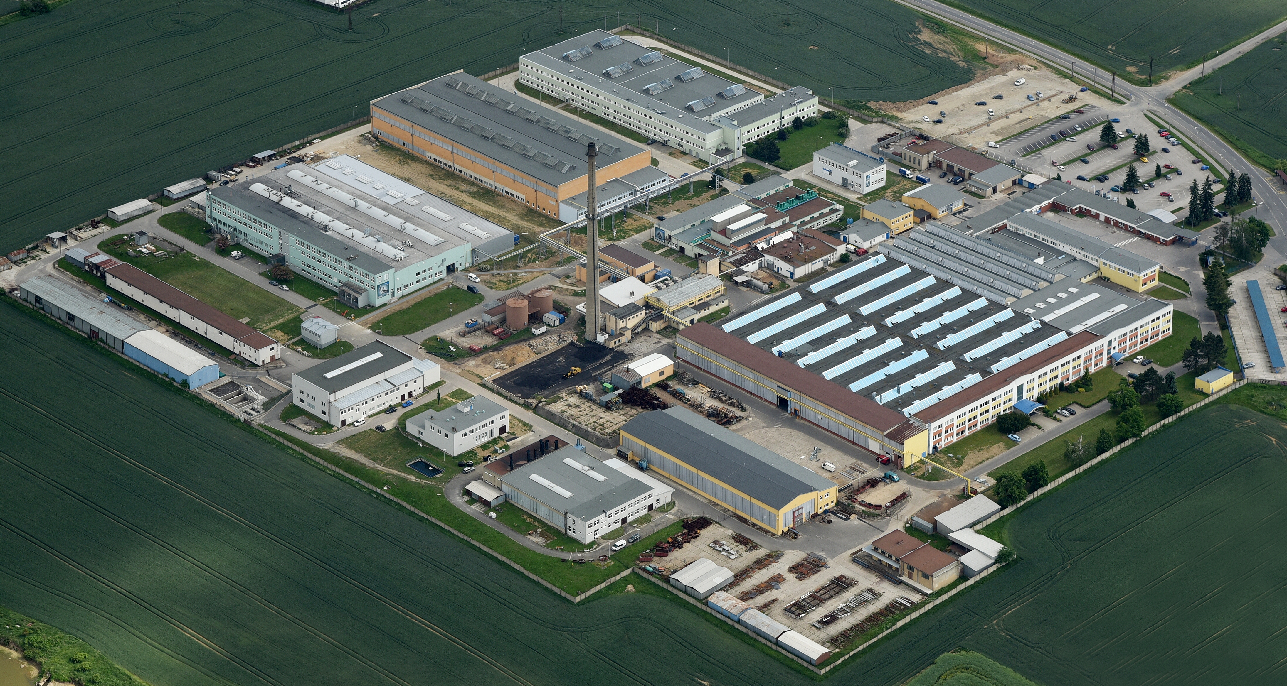 Letecký pohled na PBS